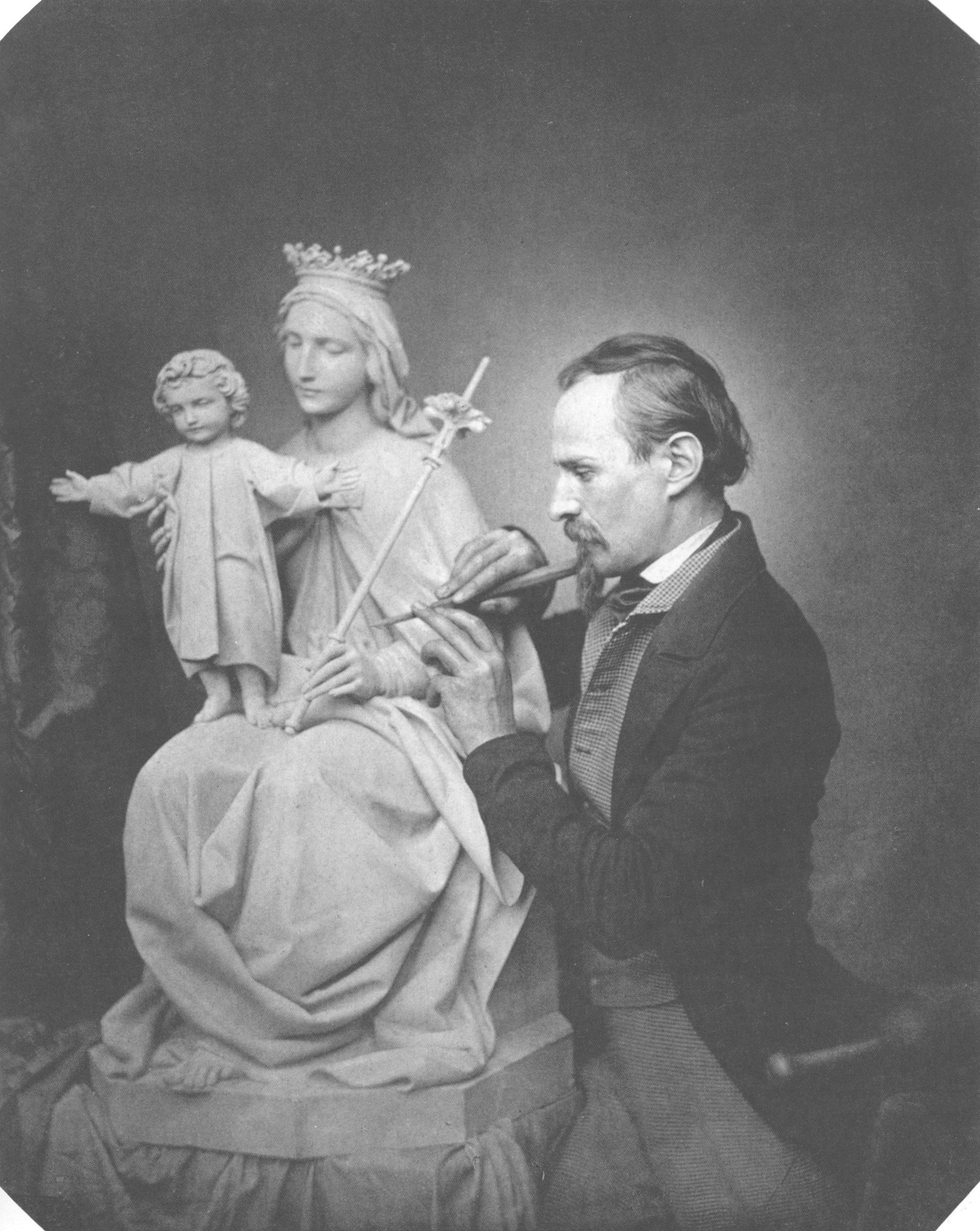 Joseph Knabl (1819-1871)